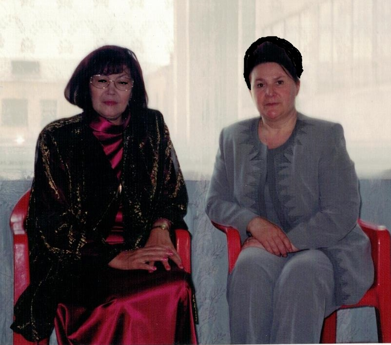 Башҡортостандың халыҡ шағиры Факиһа Туғыҙбаева һәм шағирә, йәмәғәт эшмәкәре Гүзәл Ситдиҡова